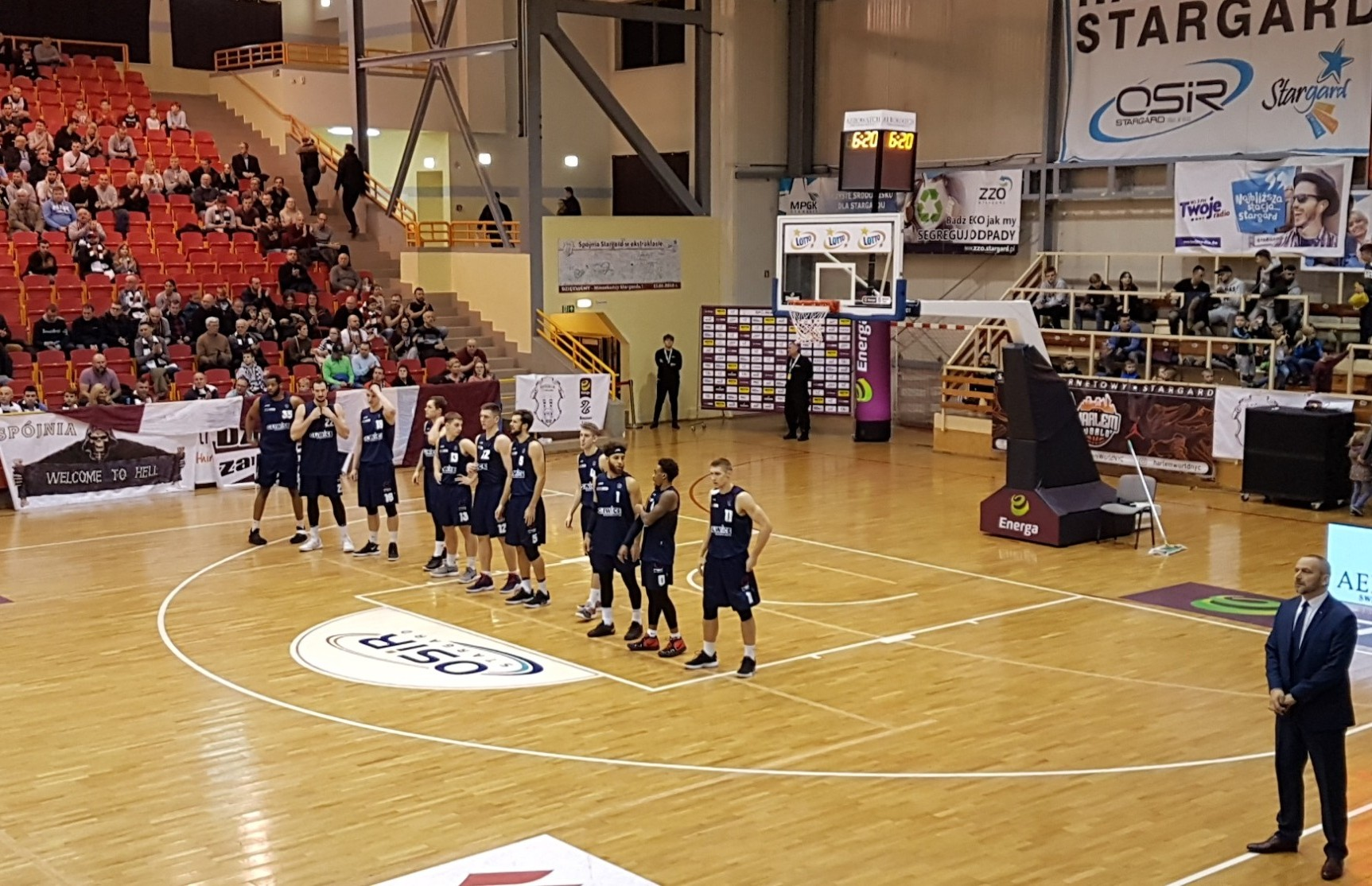 GTK Gliwice (23.12.2018)